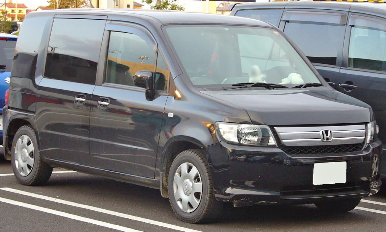 ホンダ・モビリオスパイク（後期型）